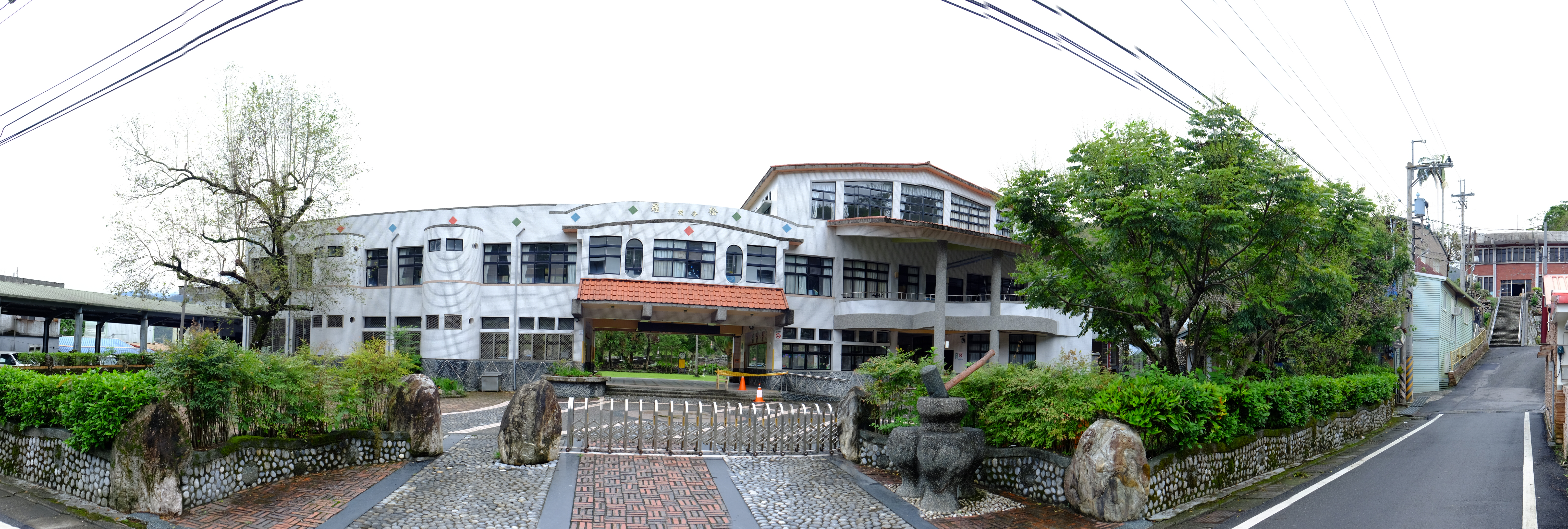 宜蘭縣大同鄉大同國民小學松羅分校。